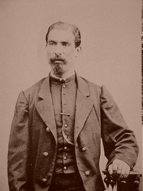 El Gral. Nicolás de Régules fue un militar mexicano de orígen español que combatió durante la Guerra de Reforma y la Segunda Intervención Francesa en México.